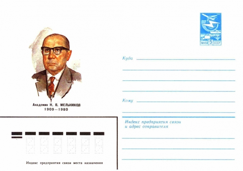 Художественные маркированные конверты 1983 года.